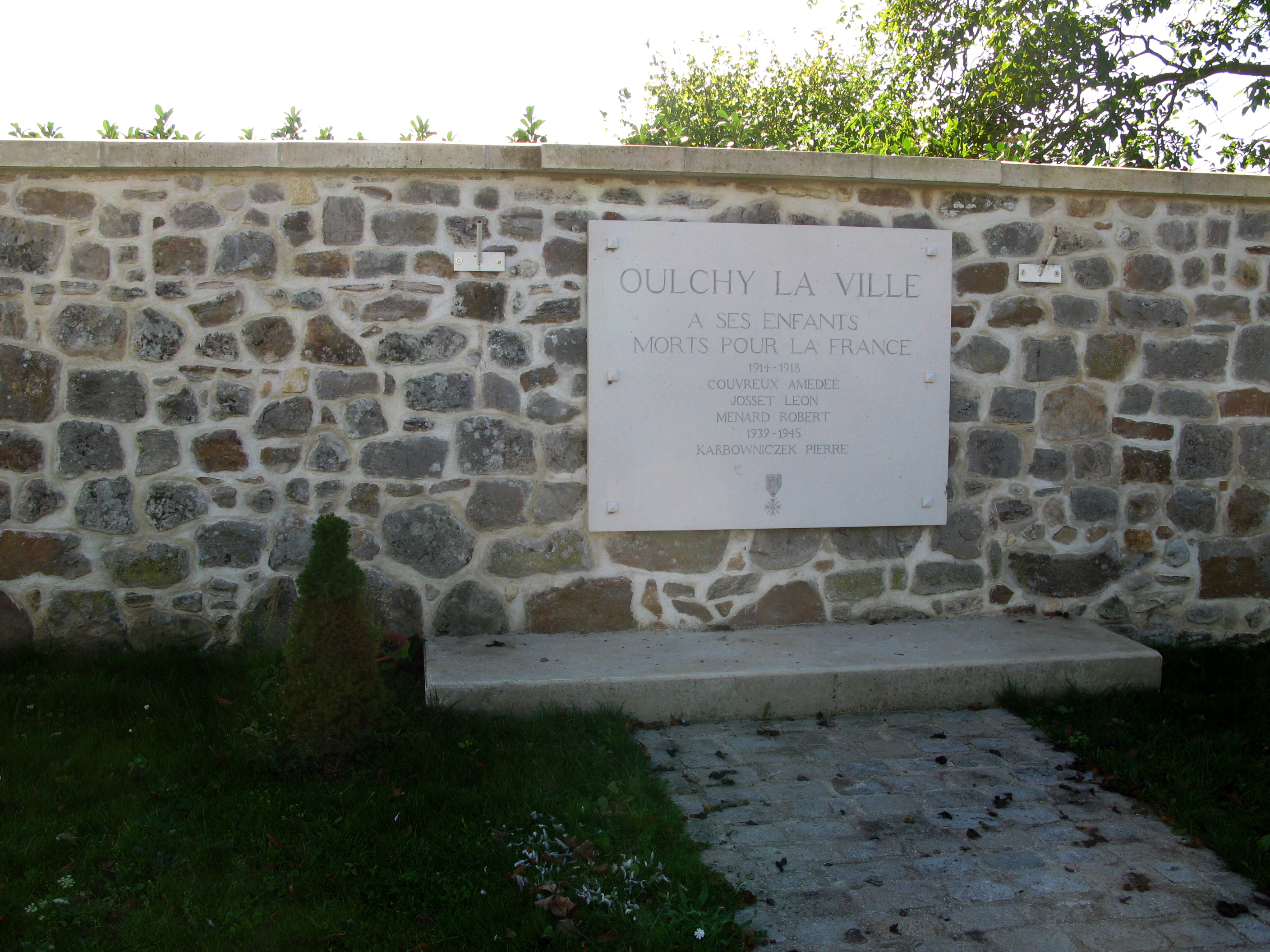 Oulchy-la-Ville (Aisne, France) - Plaque faisant office de monument-aux-morts. . .